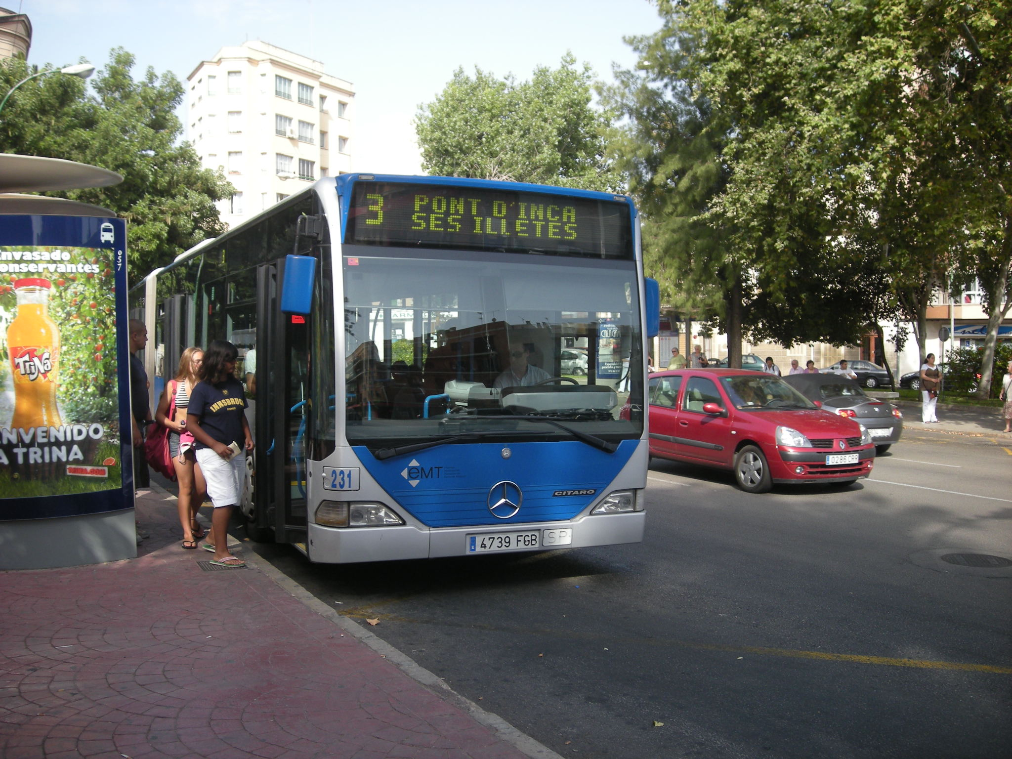 Un autobús a la parada de la Plaça del Progrés de Palma. Mallorca.